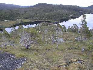 From Osen, Sør-Trøndelag, Norway.